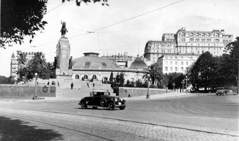 Vista del remate de la Avenida Alvear, a la izquierda el Monumento a Carlos de Alvear, hacia el centro el Palais de Glace y a la derecha el Alvear Palace Hotel, en los años '30. Buenos Aires.